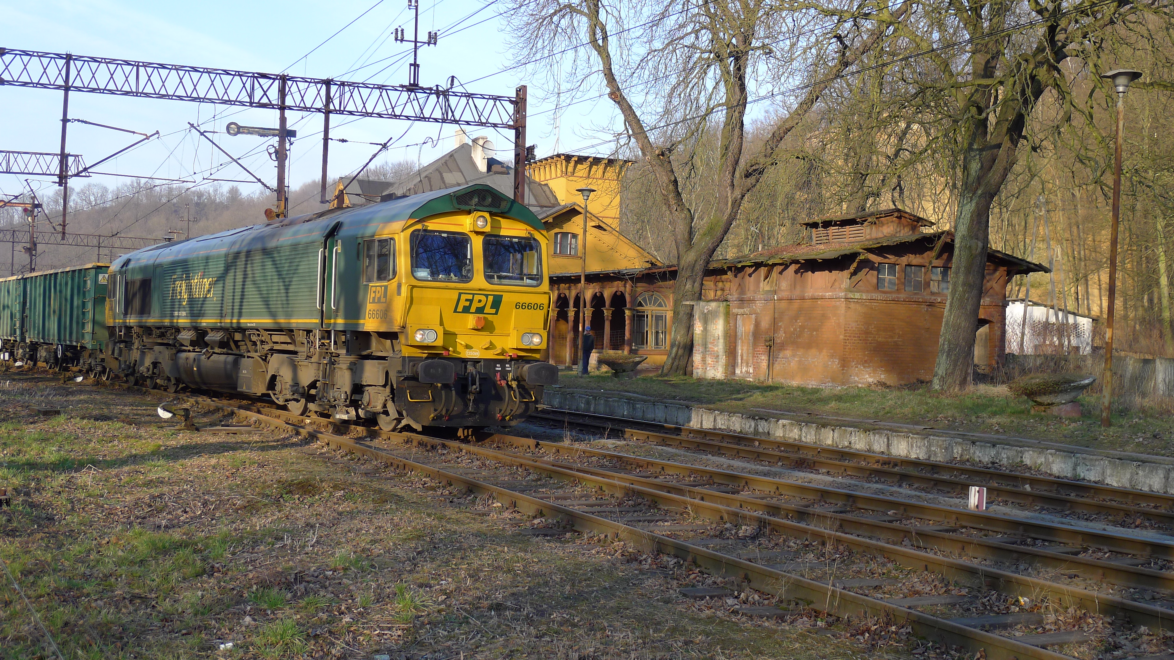 Lokomotywa spalinowa 66 006 w malowaniu przewoźnika Freightliner PL na stacji kolejowej Jerzmanice-Zdrój.